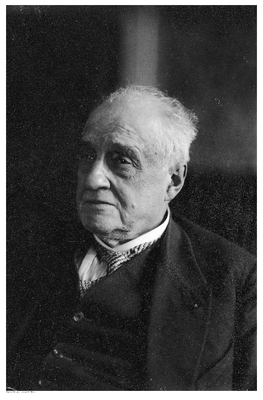 Портретна снимка на Юзеф Котарбински, полски актьор, писател и критик.